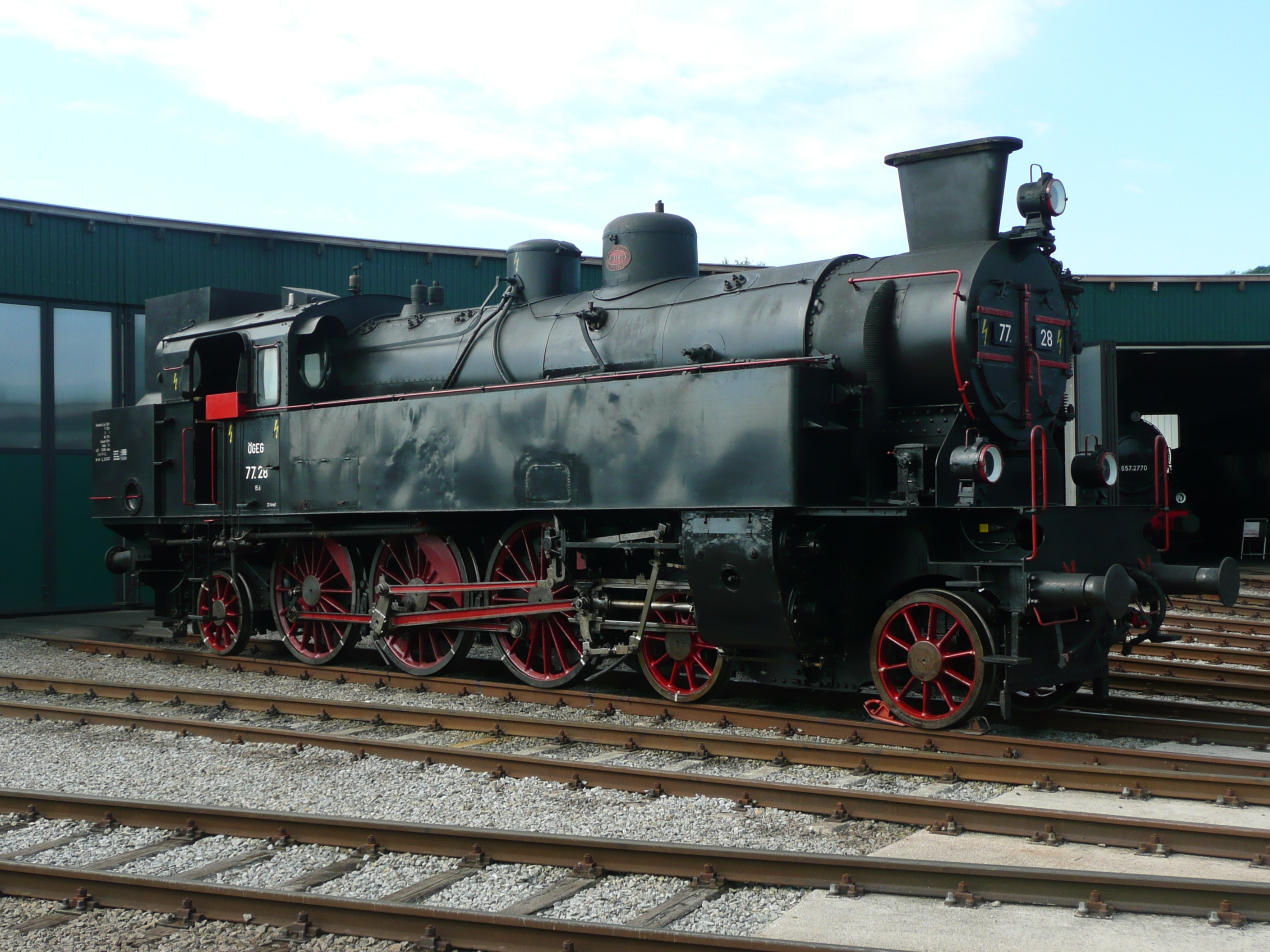 77.28 im Eisenbahnmuseum Ampflwang